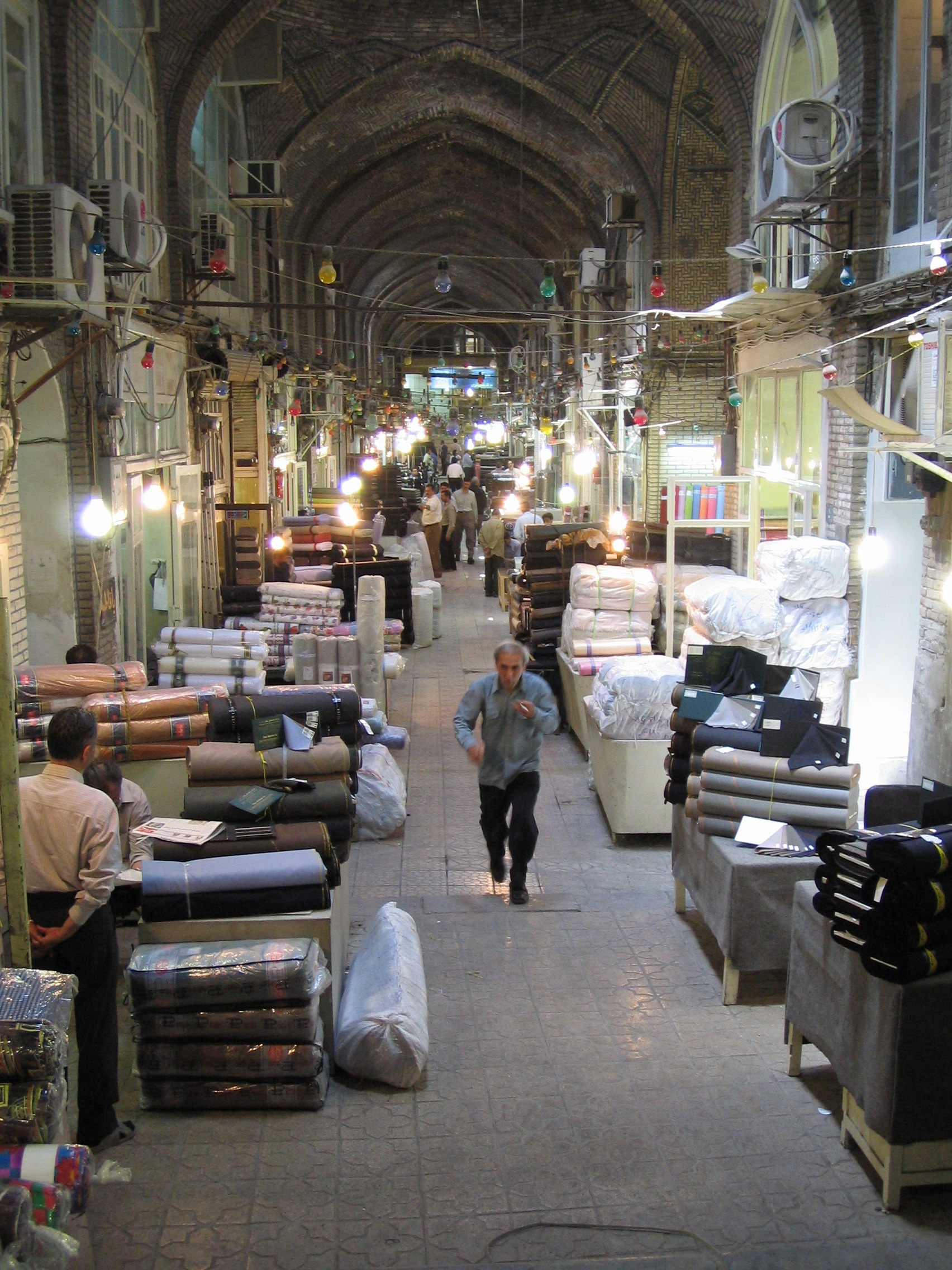 an alley in tehran's bazar